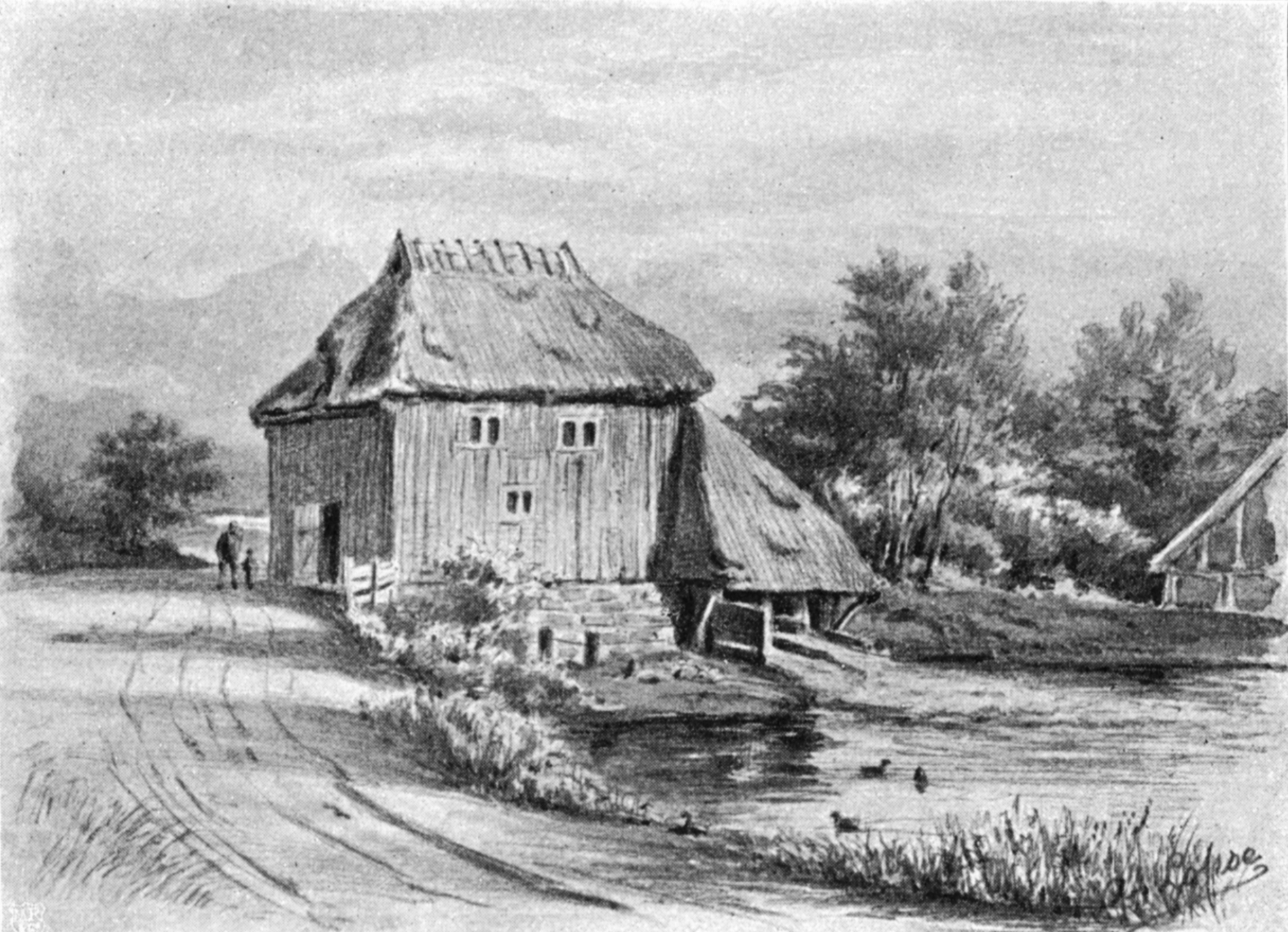 Die Mühle in Lutterbek um 1895, gezeichnet von Adolf Lohse